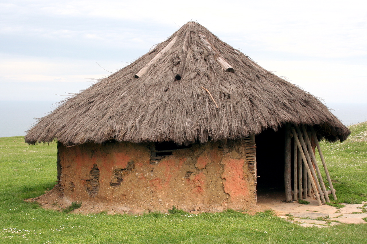 Reproducción de casa preerromana de la Campa Torres